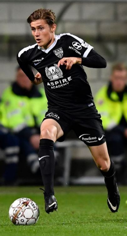 Alessio Castro-Montes (Eupen-Rupel Boom)